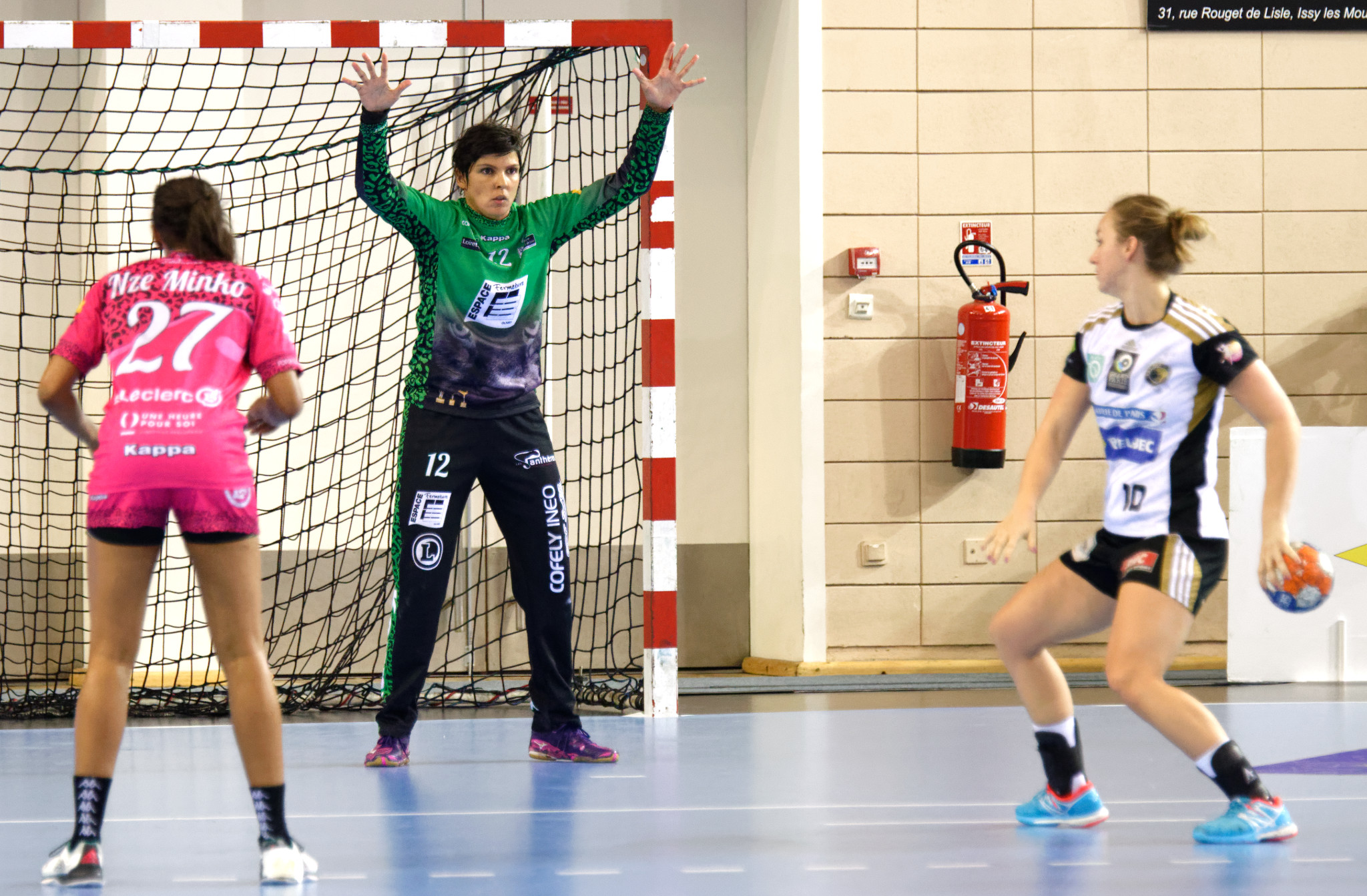 Demie-finale aller de playoff entre Issy Paris Hand et Fleury. A Issy Les Moulineaux, le 22 avril 2016.